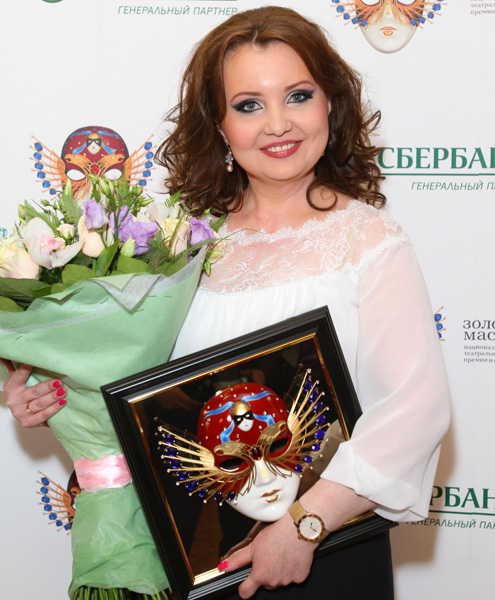 Фестиваль и премия «Золотая маска» 2012 года